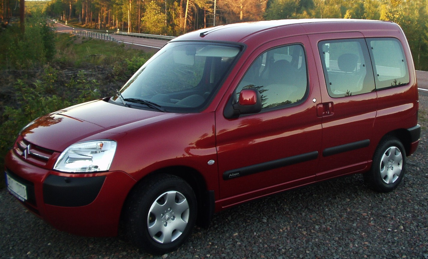 Citroën Berlingo